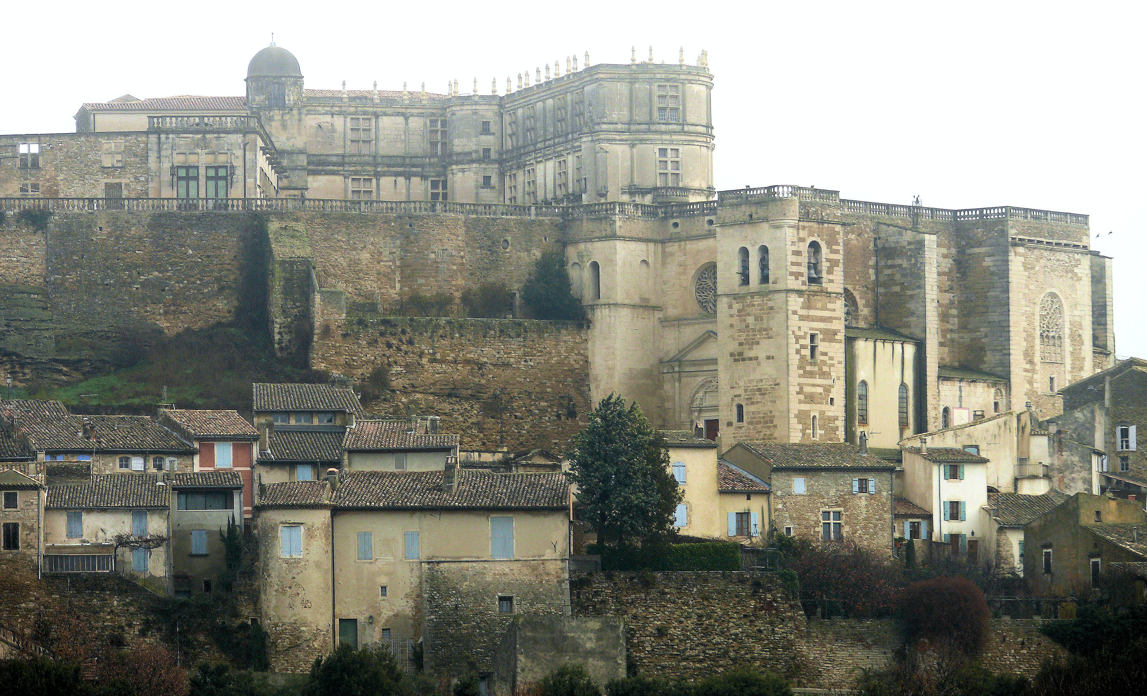 Château de Grignan, ailes sur la cour du puits, et collégiale Saint-Sauveur